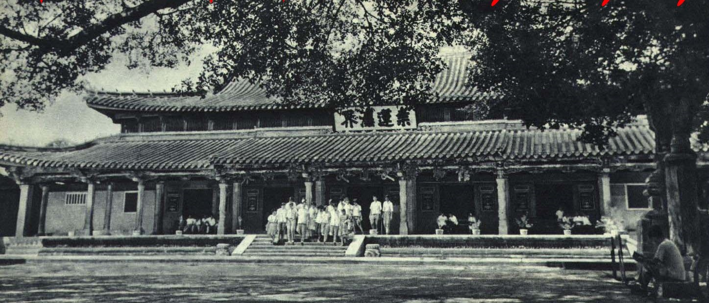 1963-01 1963年 泉州开元寺